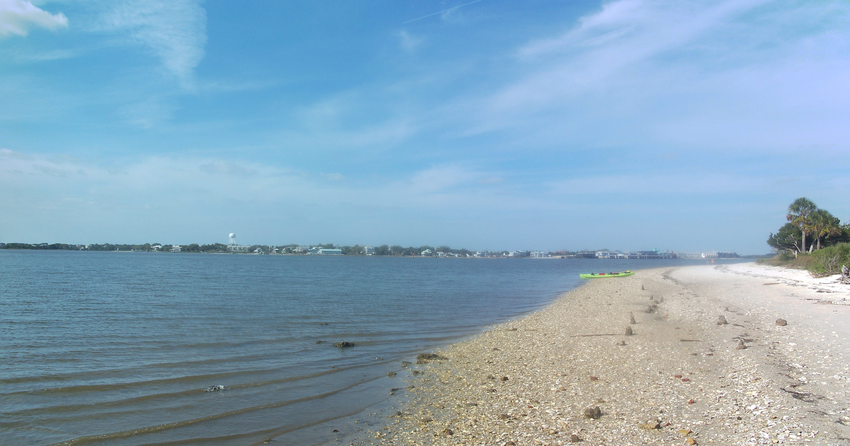 Atsena Otie Key: Looking towards Cedar Key